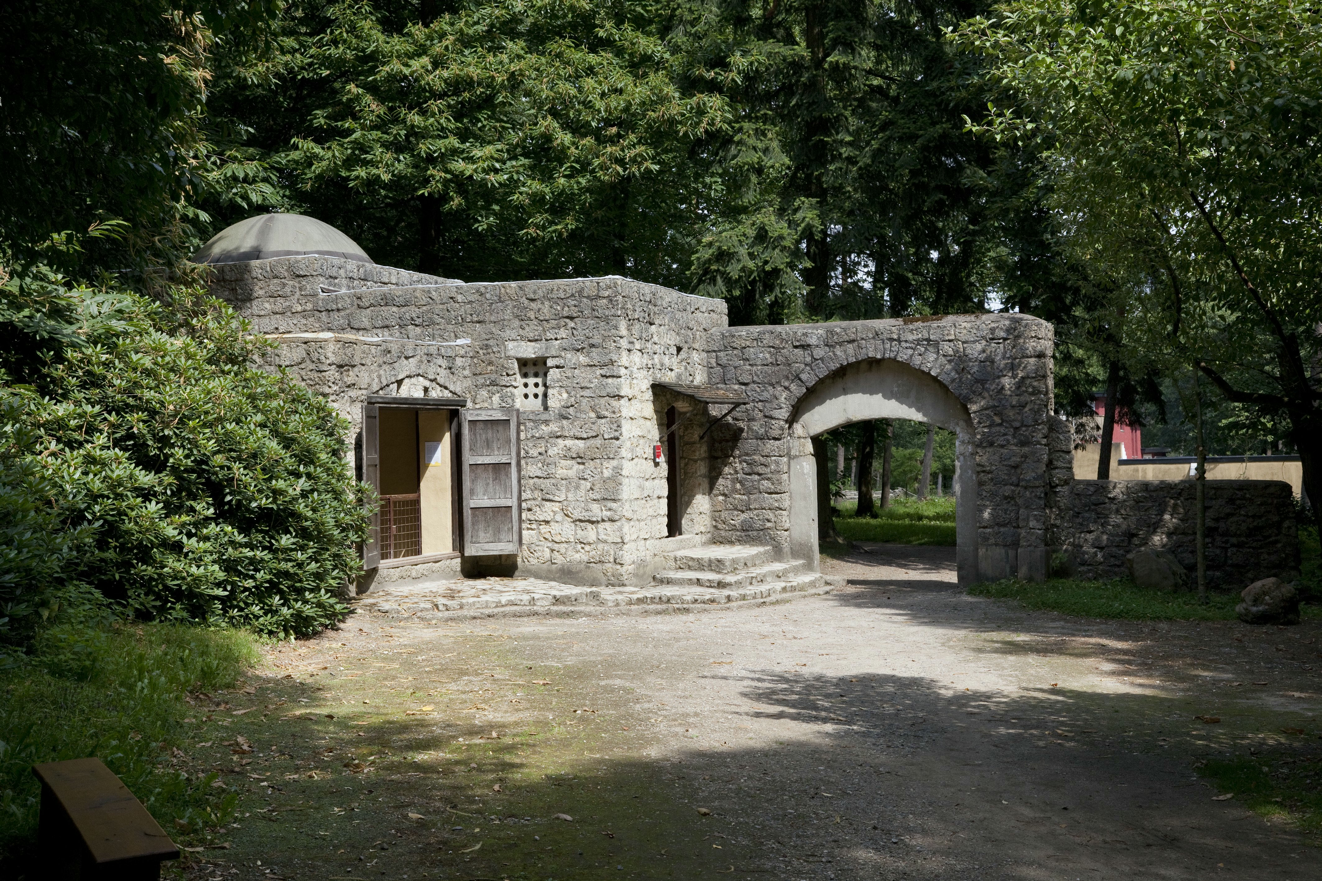 Tollenaarswoning: Overzicht voorgevel, linker zijgevel van de Tollenaarswoning